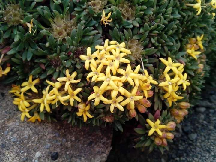 Imagen sacada en el Cabo Domingo (Tierra del Fuego)